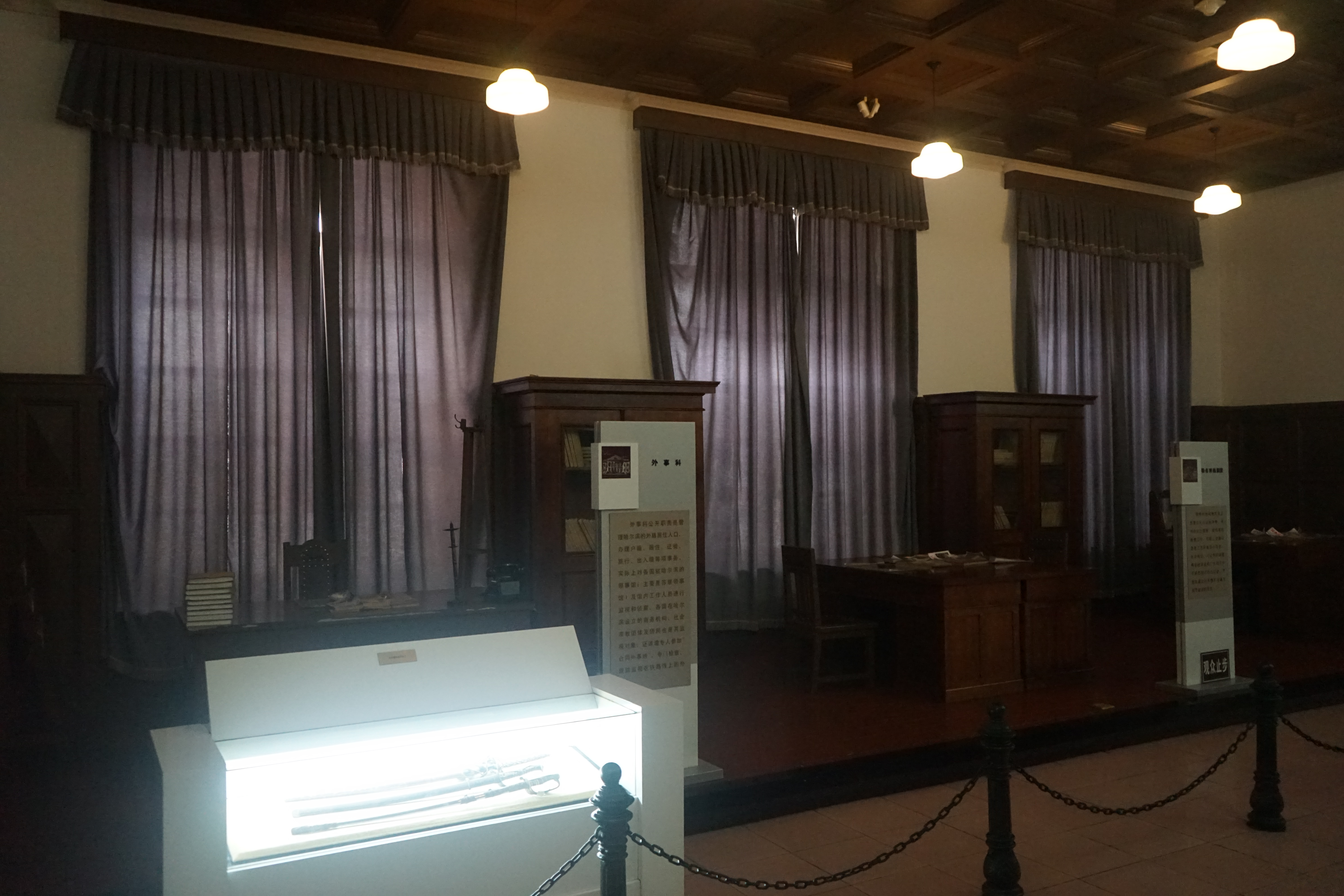 中文（中国大陆）: 满洲国哈尔滨警察厅 外事科。公开职责是管理外籍居住人口，办理户籍、迁徙、居住、旅行、出入境等，实际上对各国驻哈尔滨领事馆（重点是苏联）进行监视、侦查。各国商务机构、社会宗教团体和侨民也是监察对象。右边为特务检阅股：负责文化行政上的审查、书看杂志出版物、新闻上的检查。实际上收集民心动态、社会舆论，监视知识分子的思想动态，杜绝反满抗日活动